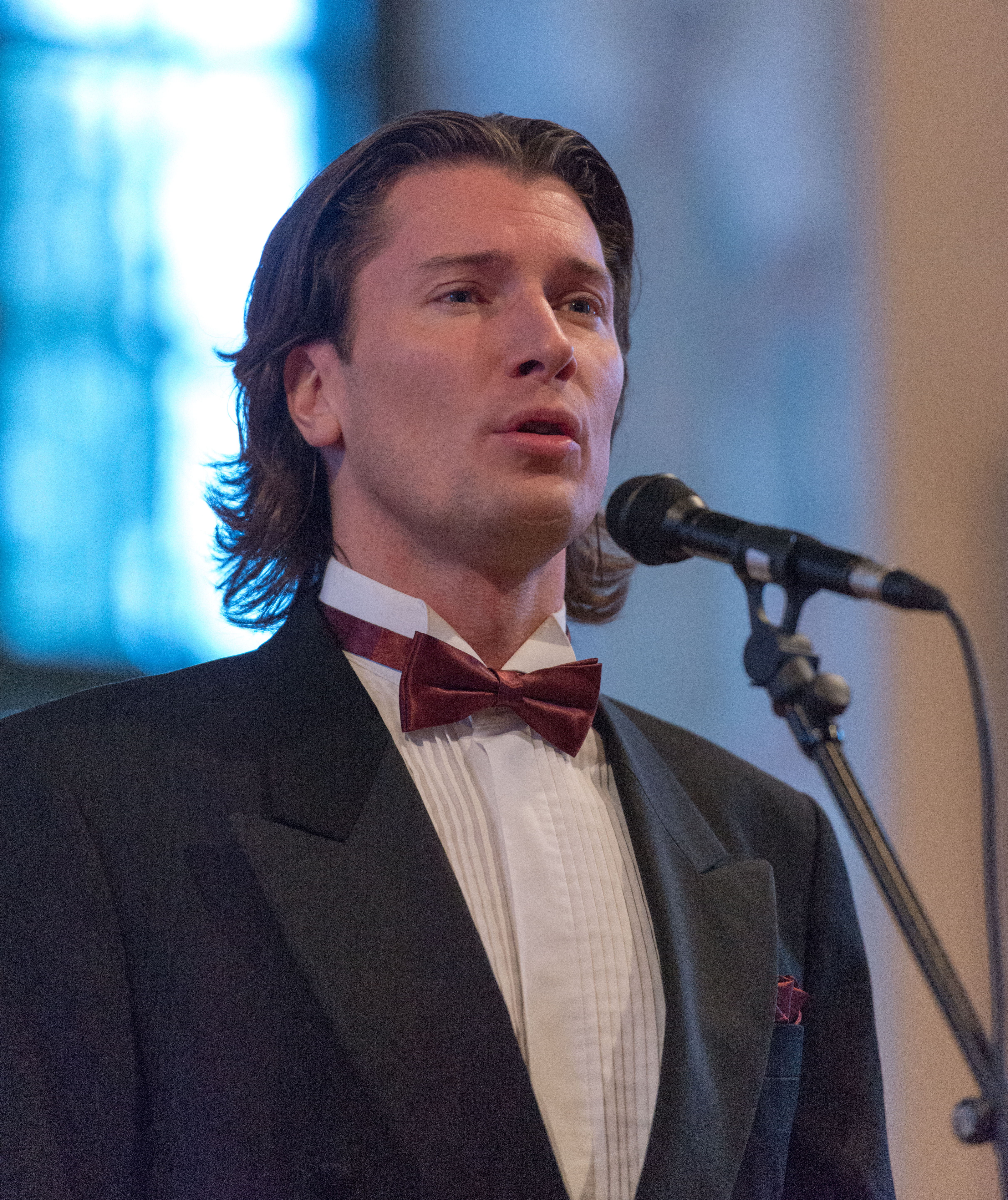 Tomi Metsäketo, suomalainen oopperalaulaja